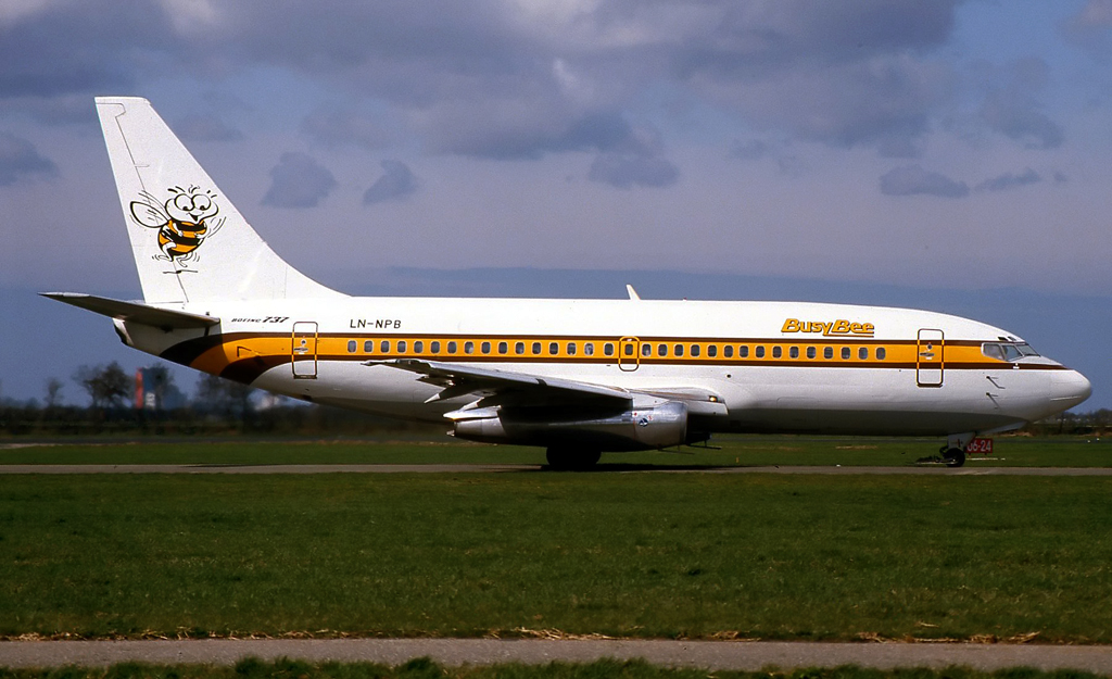 LN-NPB B737-200 BusyBee 1987